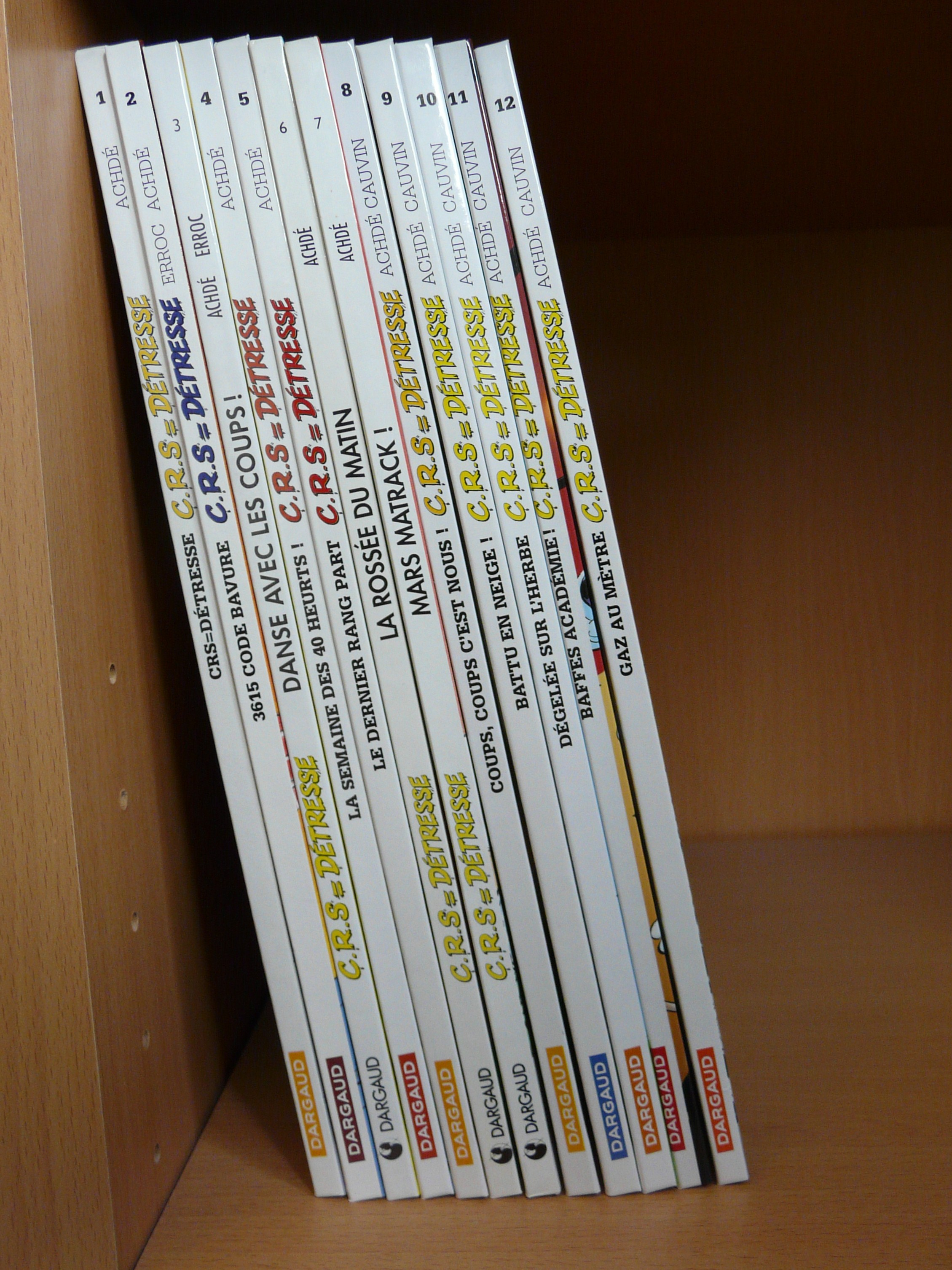 Collection de bande dessinée C.R.S.=Détresse, numéros 1 à 12.